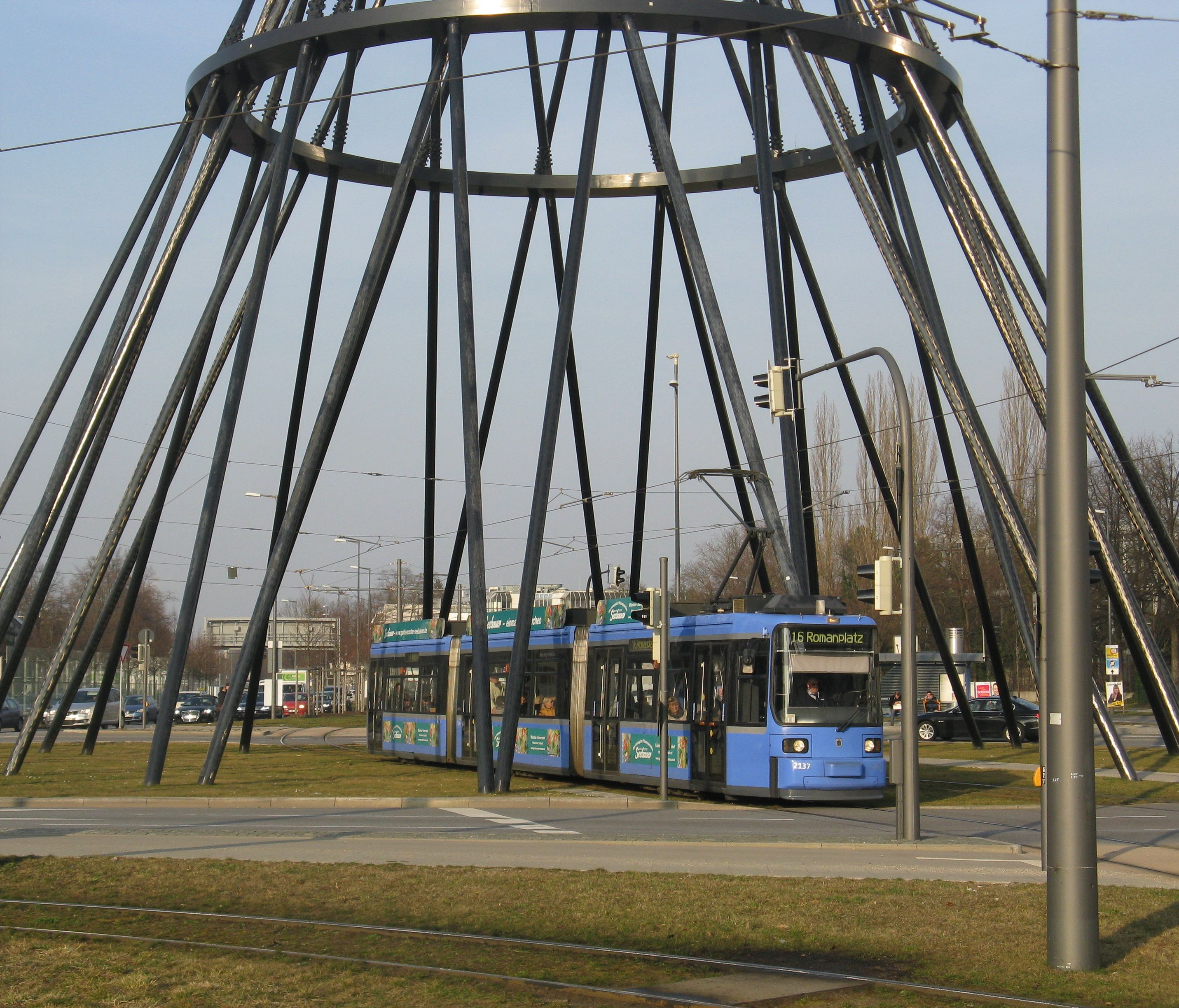 Mae West (Kunstwerk): durchfahrende Straßenbahn